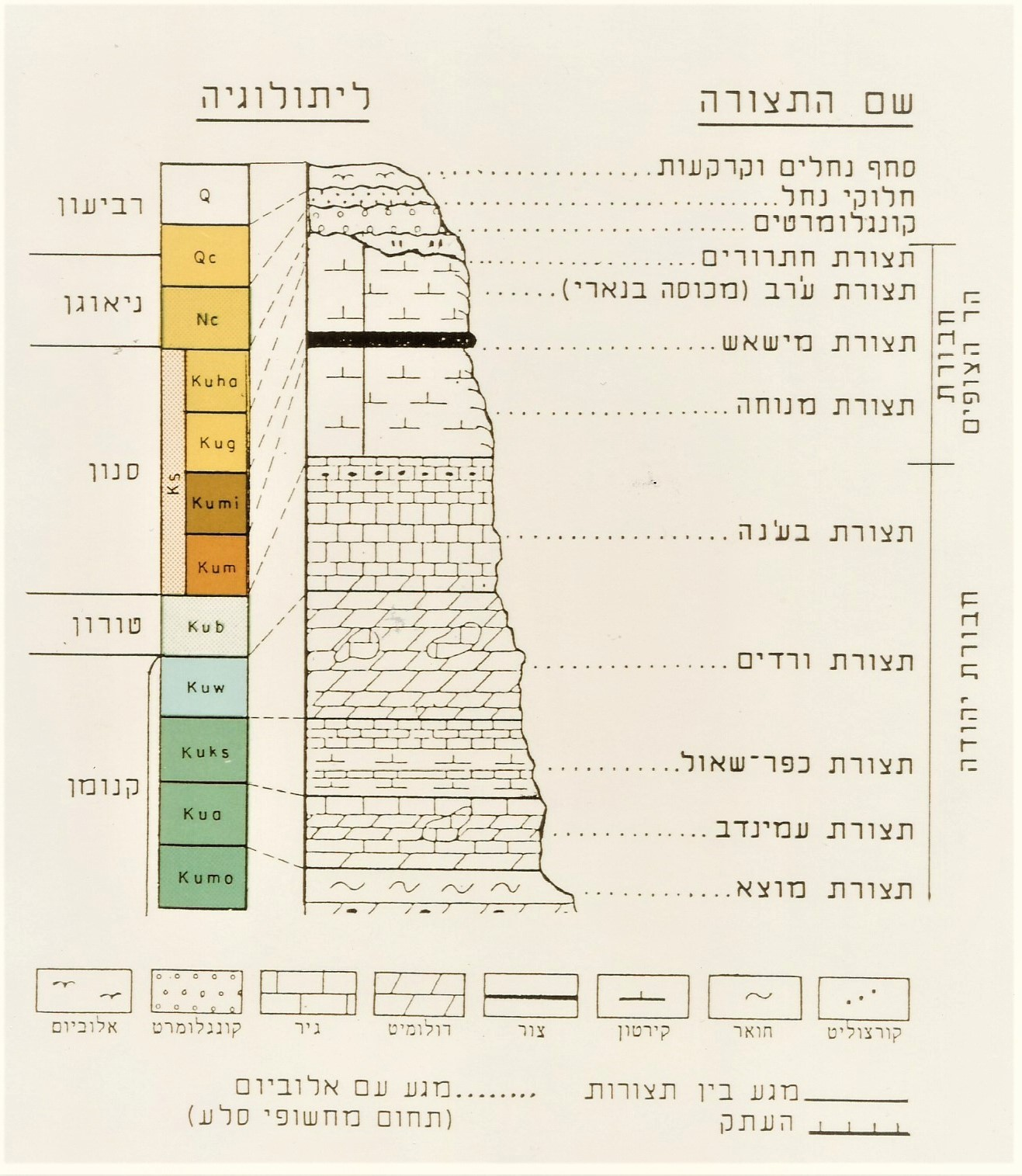 חתך סטרטיגרפי של חבורת יהודה